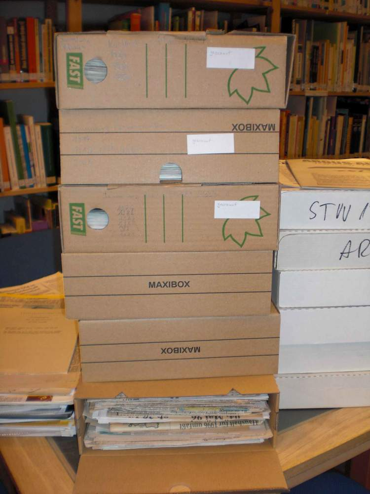 Archivboxen in Potsdam